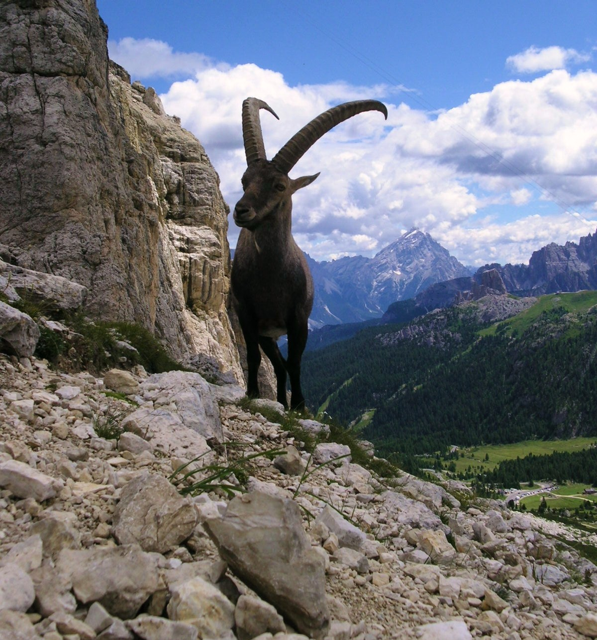 Stambecco sul Piccolo Lagazuoi